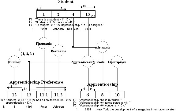 Student Apprenticeship na GLR transformatie.